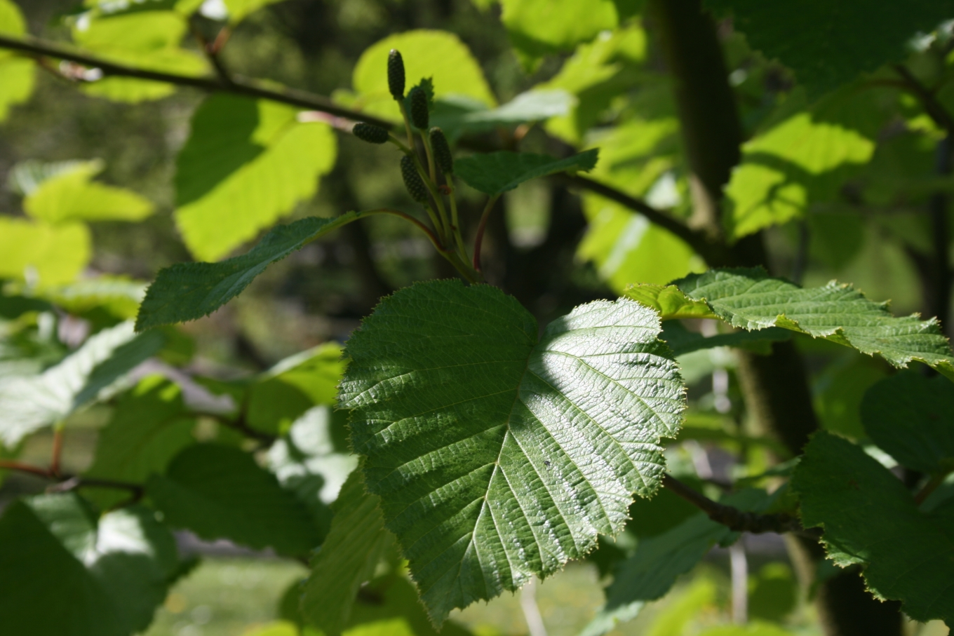 Alnus viridis subsp. maximowiczii foliage.